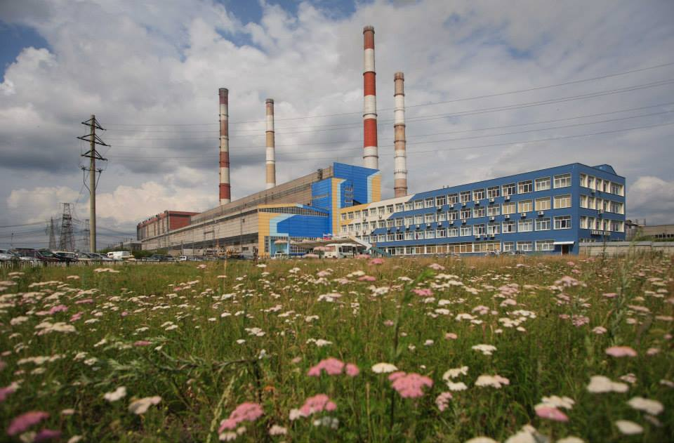 Цветы у ГРЭС